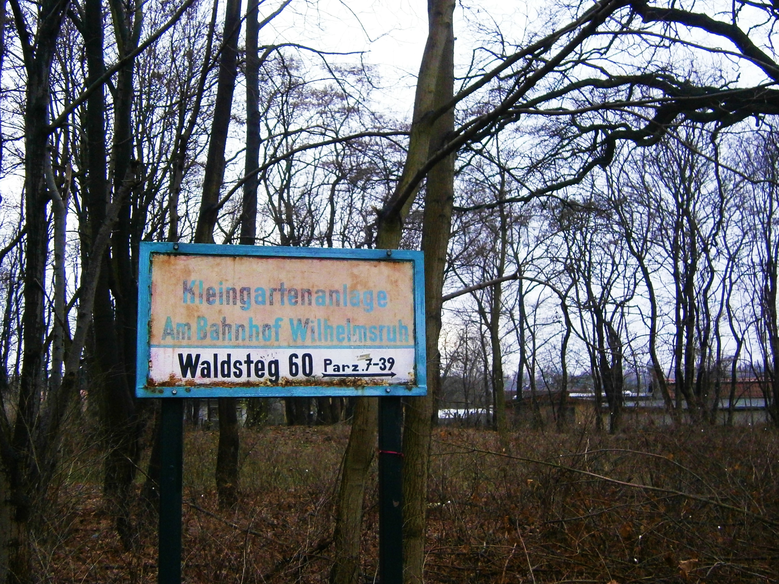 Der Waldsteg ist eine Straße in Berlin-Niederschönhausen und Berlin-Wilhelmsruh. Im letzteren Ortsteil liegt die Kleingartenanlage Am Wilhelmsriher Bahnhof durch die das Grundstück 60 in den Ortsteil geriet.